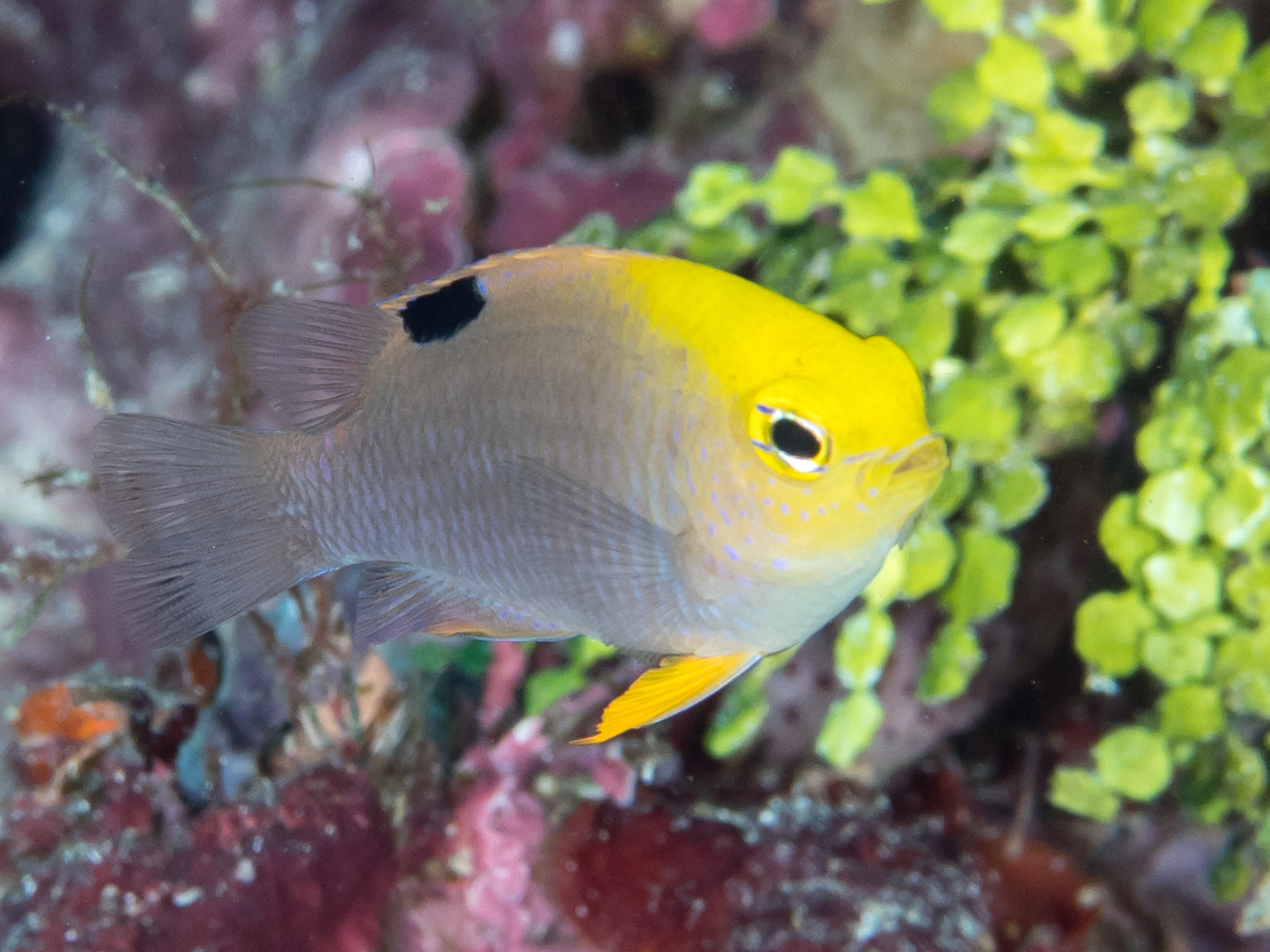 Morotai, Indonesia - Talbots damsel (Chrysiptera talboti)